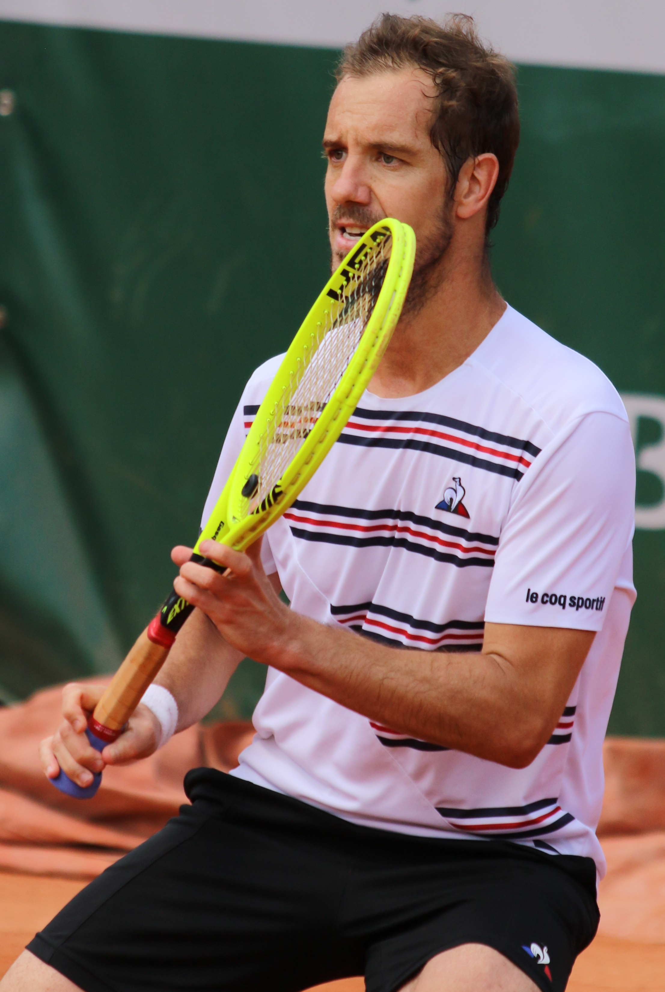 Gasquet RG19 (33)